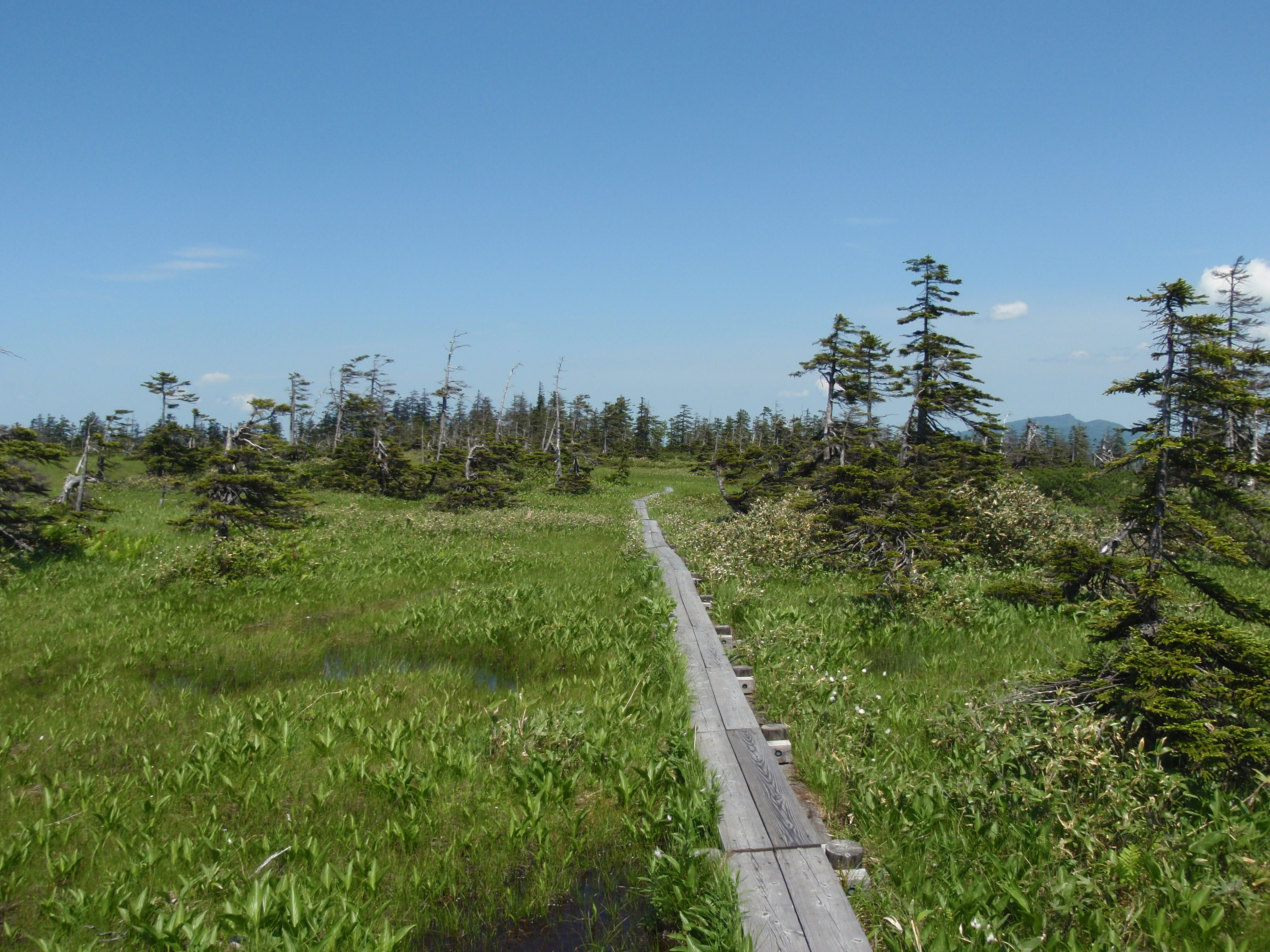 松山湿原の木道